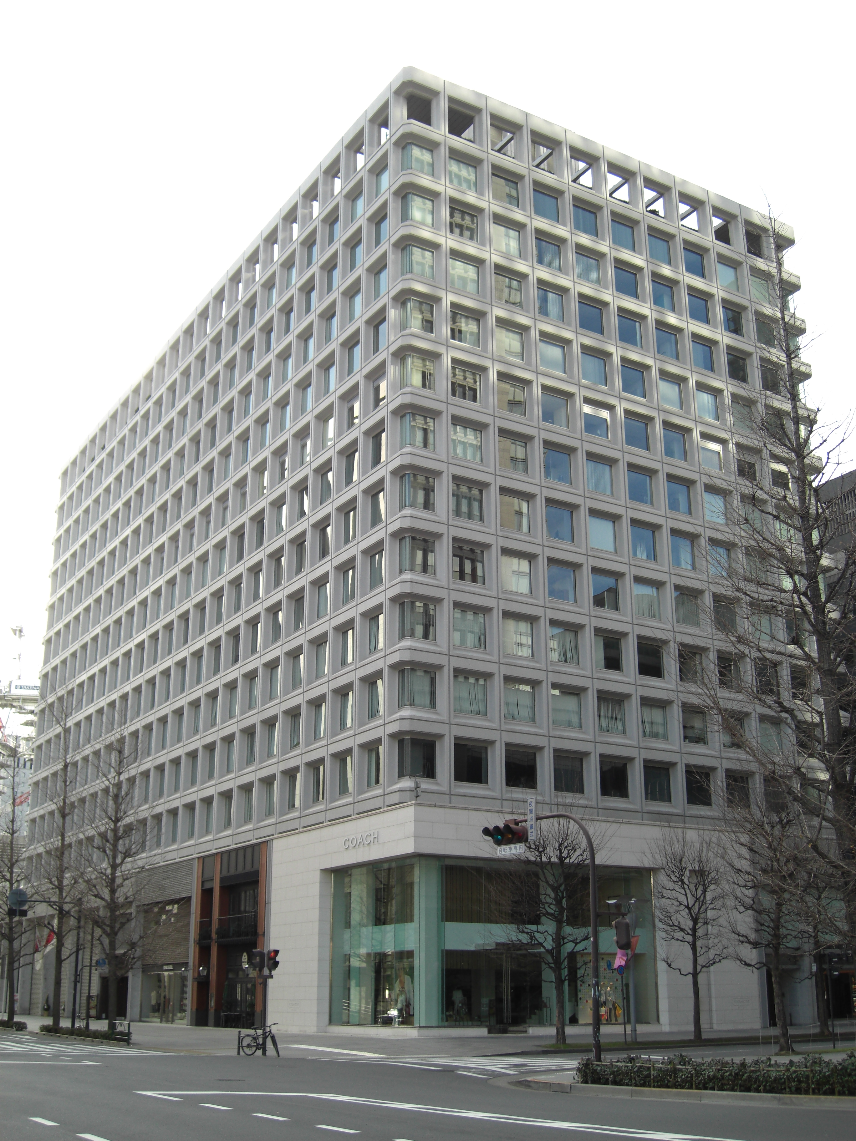 Mitsubishi Building (5-2, Marunouchi 2-chome, Chiyoda-ku, Tokyo, Japan)